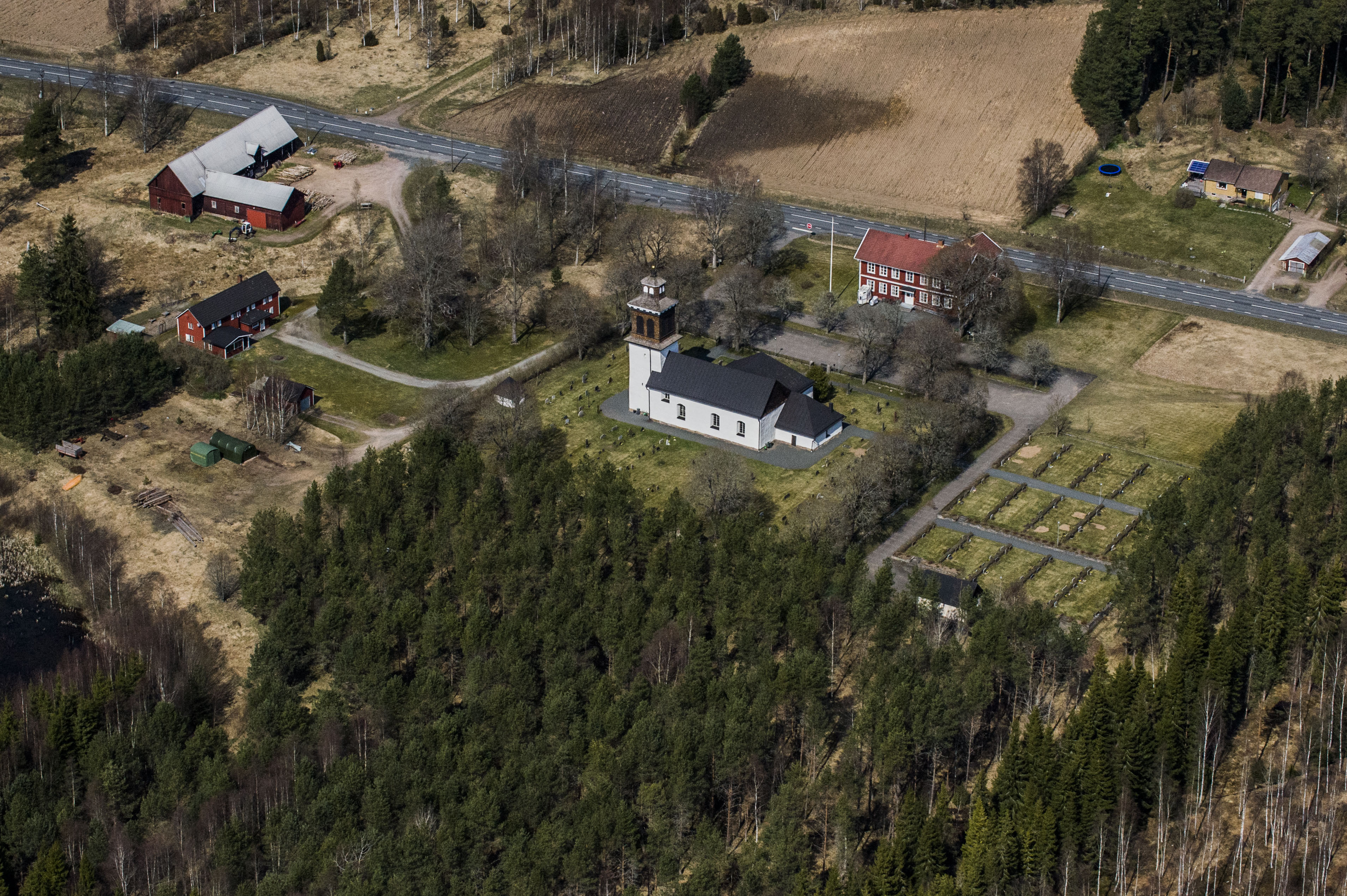 Bälaryds kyrka från luften